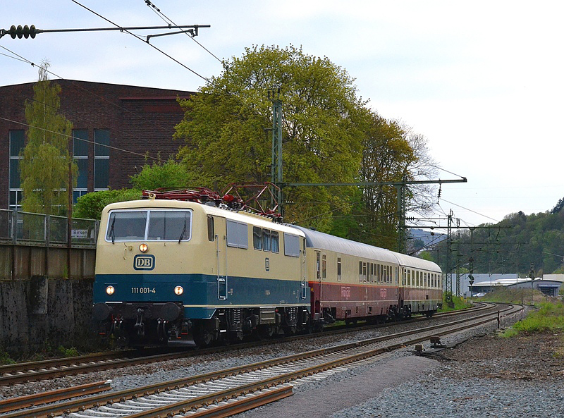 111 001 mit einem Sonderzug auf der Siegstrecke bei Niederschelden.